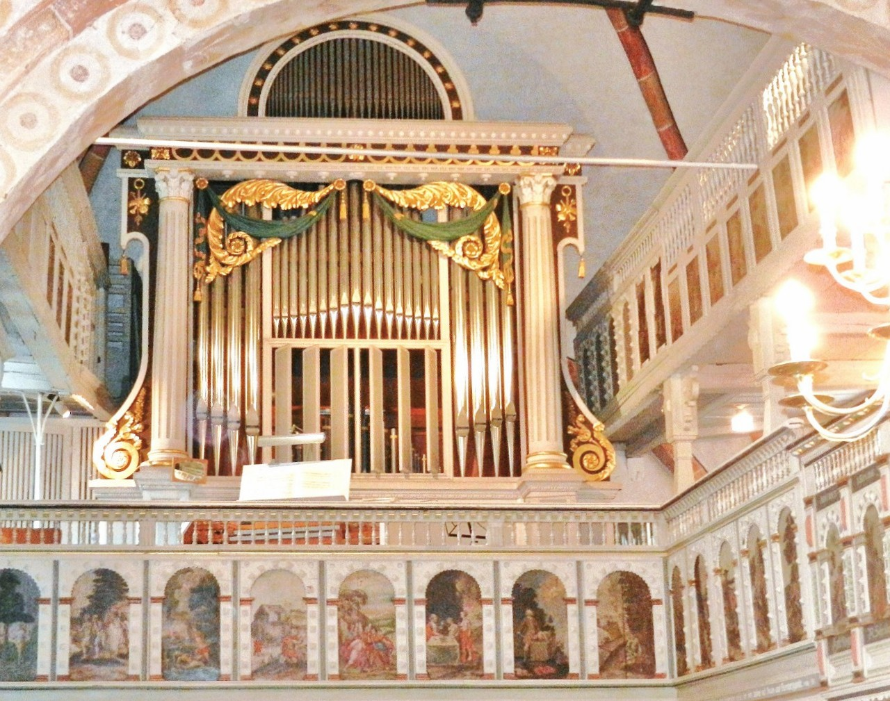 Orgel der Johanneskirche in Bad Zwischenahn, Landkreis Ammerland, Niedersachsen